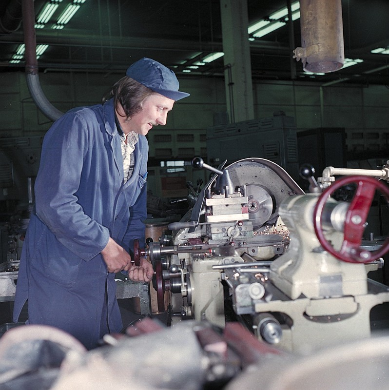 Original image description from the Deutsche Fotothek Zerspannungsfacharbeiter